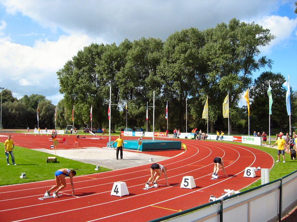 Wilhelmshaven, Sportanlage Freiligrathstraße